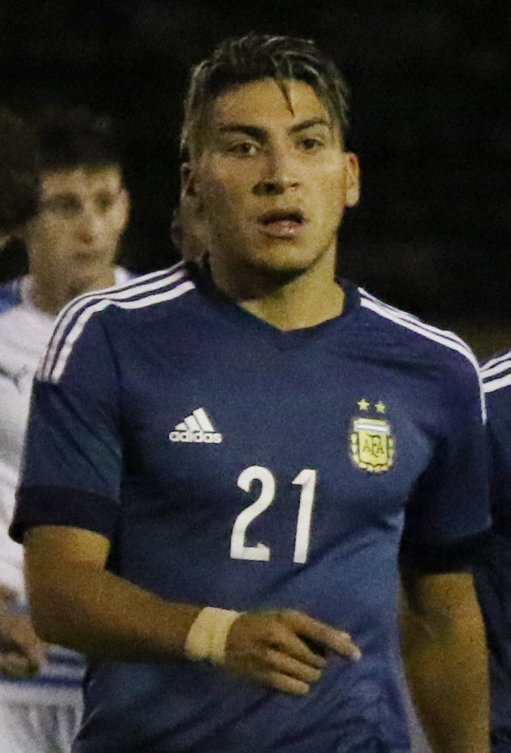 ARGENTINA URUGUAY 3 MAV